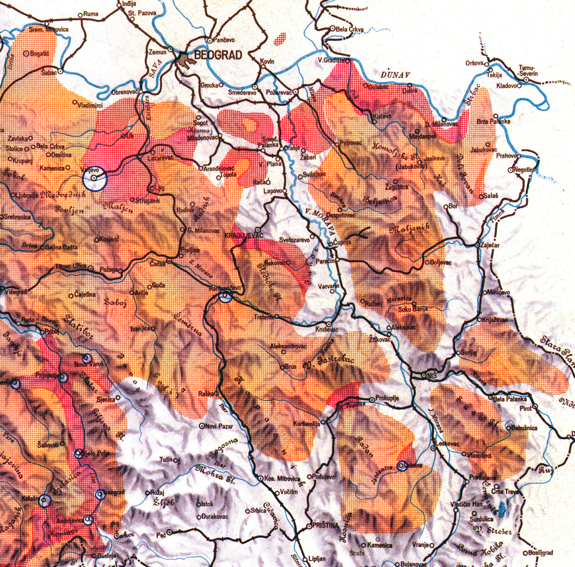 Srpskohrvatski / српскохрватски: Oslobođena i poluoslobođena teritorija septembra 1941 godine u Srbiji, poznata kao Užička republika.